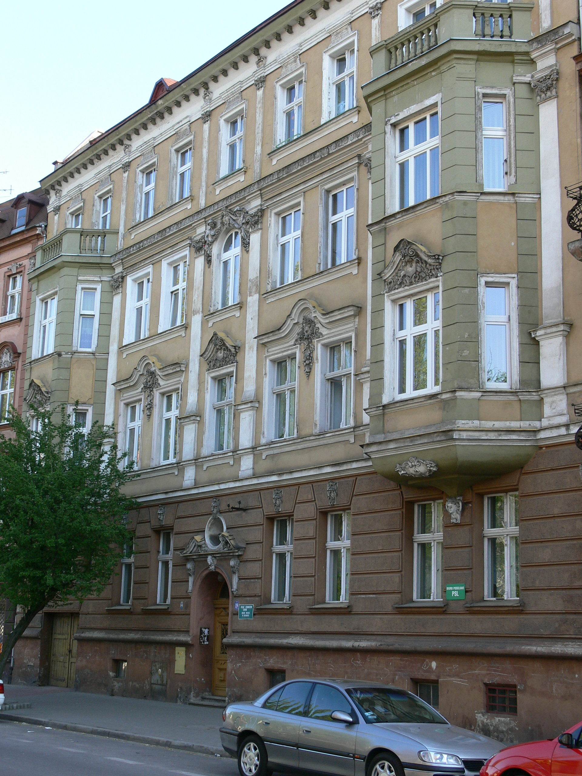 Racibórz - kamienica przy ul. Staszica 19